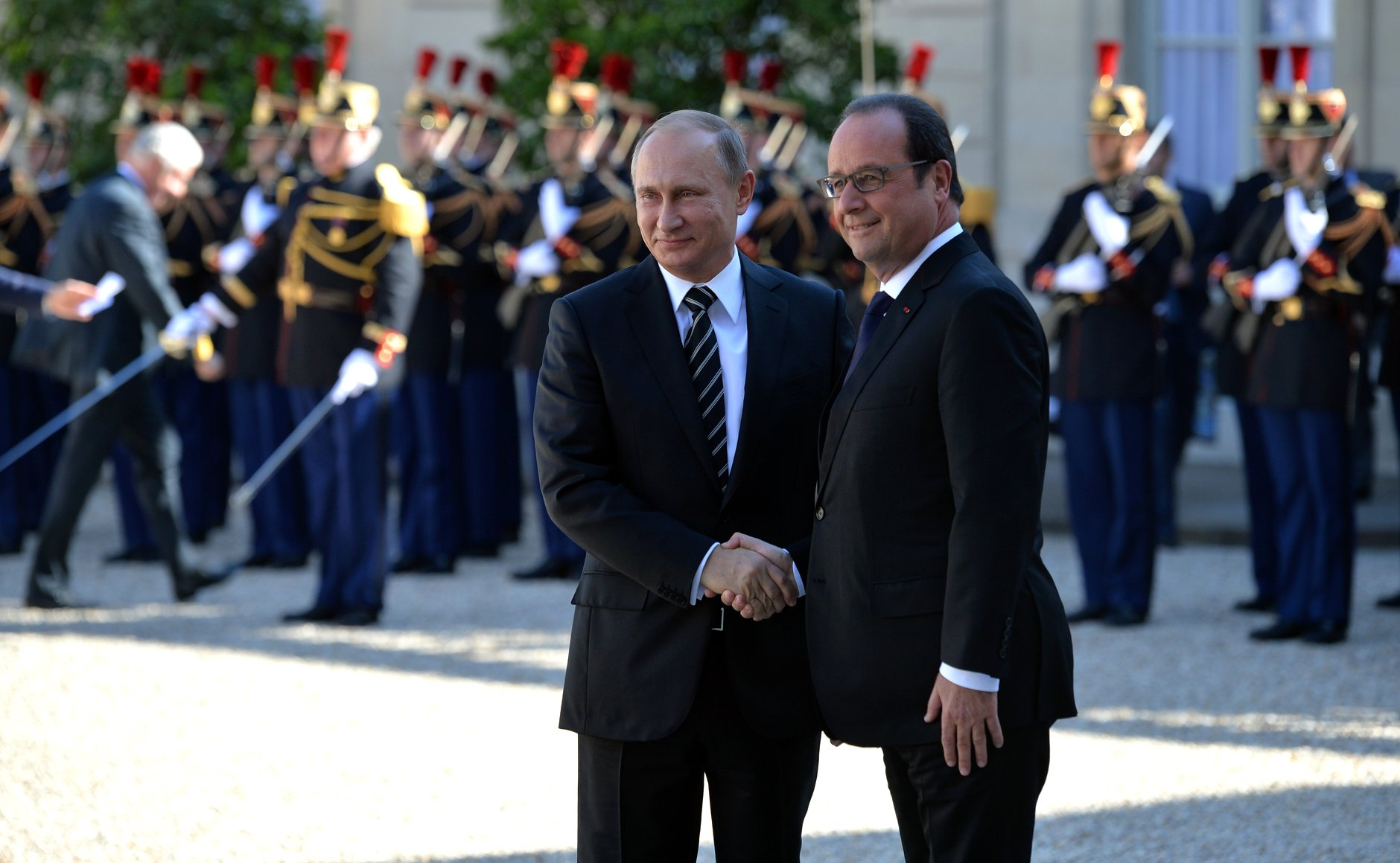 Перед началом встречи Президента России Владимира Путина с Президентом Франции Франсуа Олландом